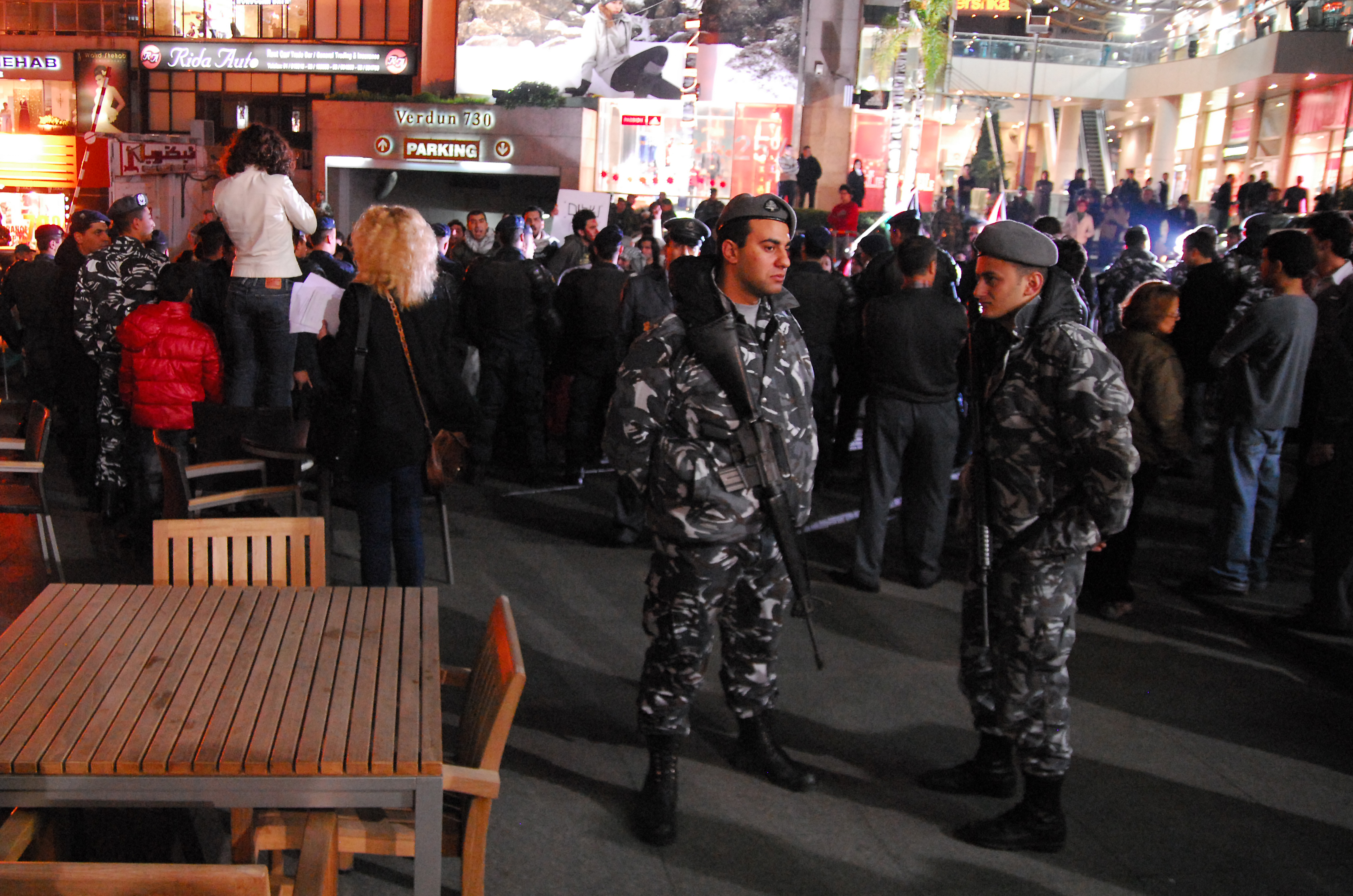 Starbucks protest, Verdun, Beirut